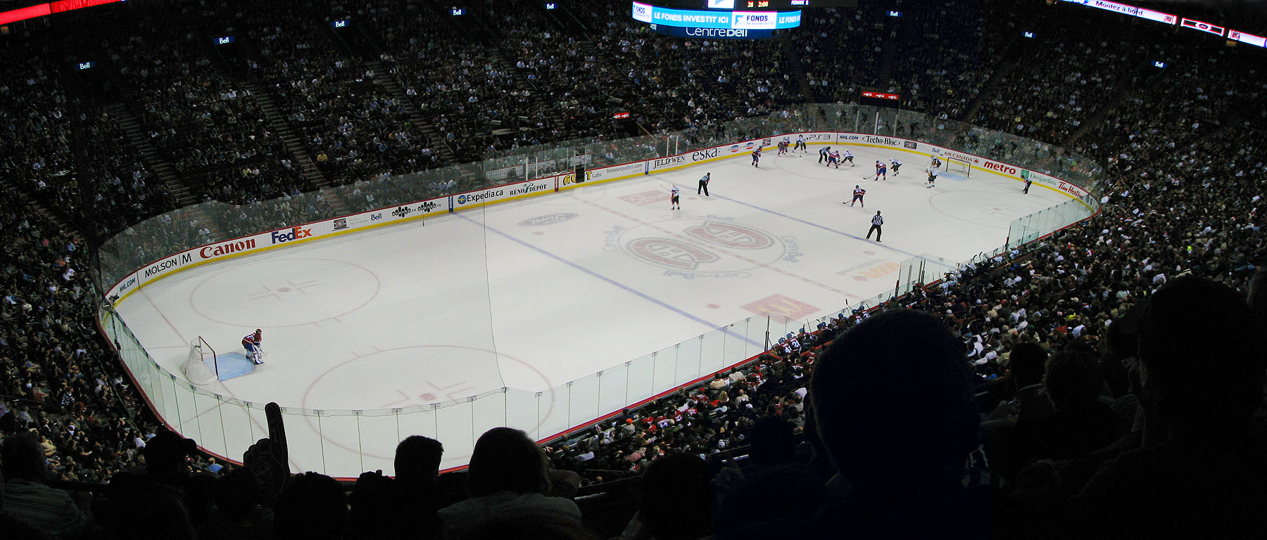 Les Canadiens de Montréal affrontent les Sabres de Buffalo au Centre Bell le 3 avril 2010.